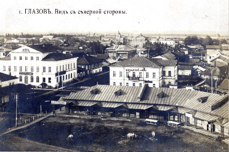 Вид на Глазов с северной стороны